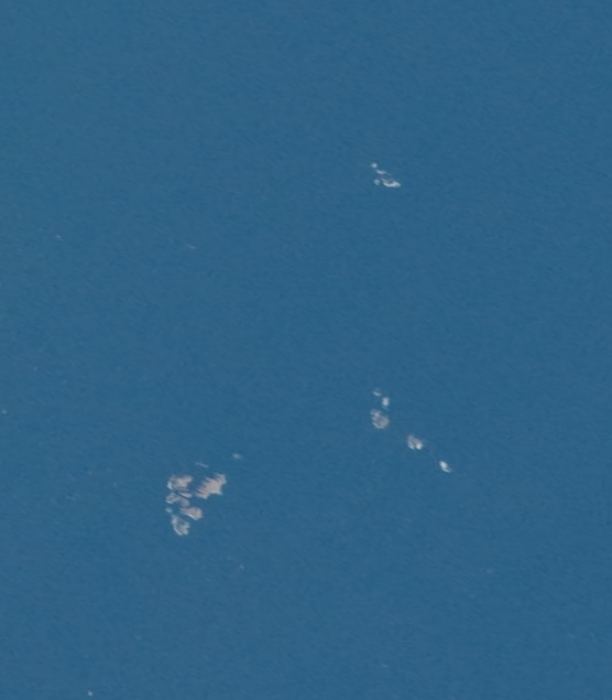 Острова Осколки. Снимок с МКС. Фрагмент